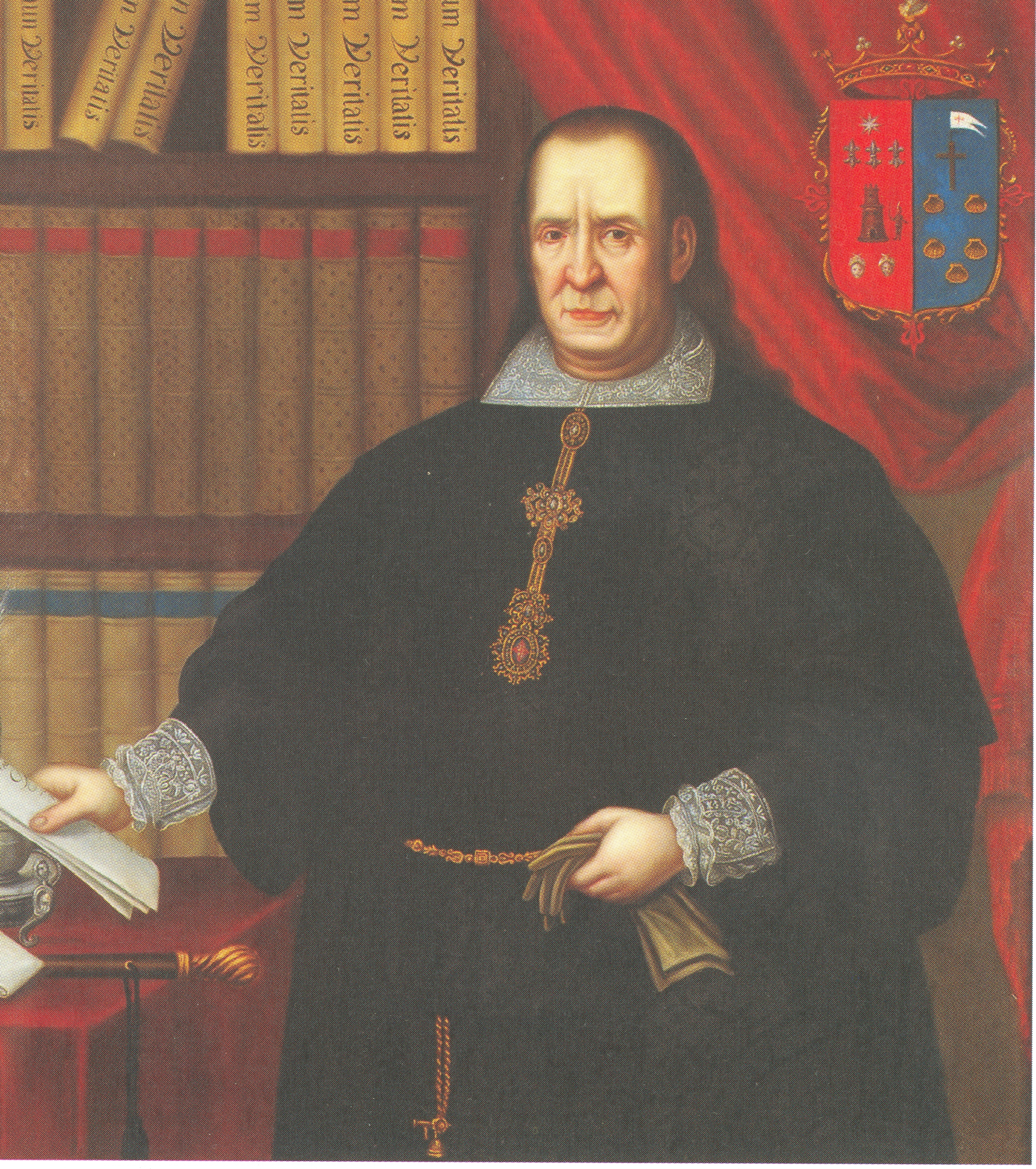 Portrait of Joseph de Santiago Concha y Salvatierra Primer Marqués de Casa Concha (1667-1741). Colección del Museo Histórico Nacional de Chile (2009). La Pintura como Memoria Histórica. Dirección de Bibliotecas, Archivos y Museos de Chile, Santiago de Chile Año 2009. Imagen consultada en el Fondo de Bibliografía Digital del Archivo Histórico del Guayas (AHG) Guayaquil, Ecuador.Consultado y compartido por el usuario J. Javier García A.